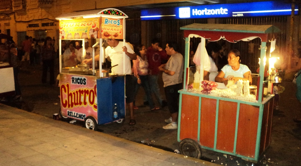 Carritos de comida en el lado sur de la Plaza de Armas, Iquitos (Perú).